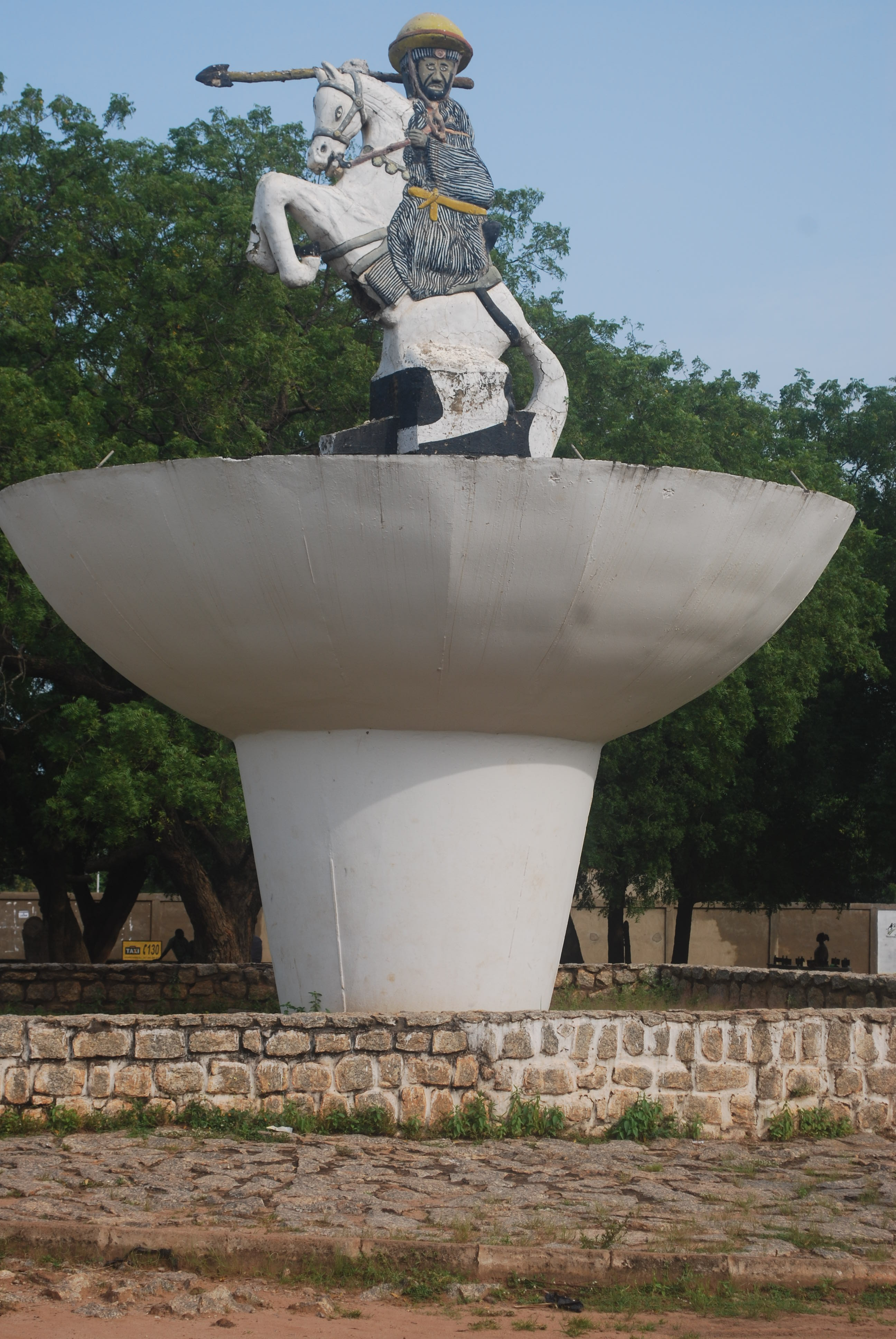 Bio Guéra est un prince guerrier Wassangari, un peuple du Nord. Ce monument représente ce vaillant guerrier qui a mené plusieurs résistances contre la colonisation française au Bénin.